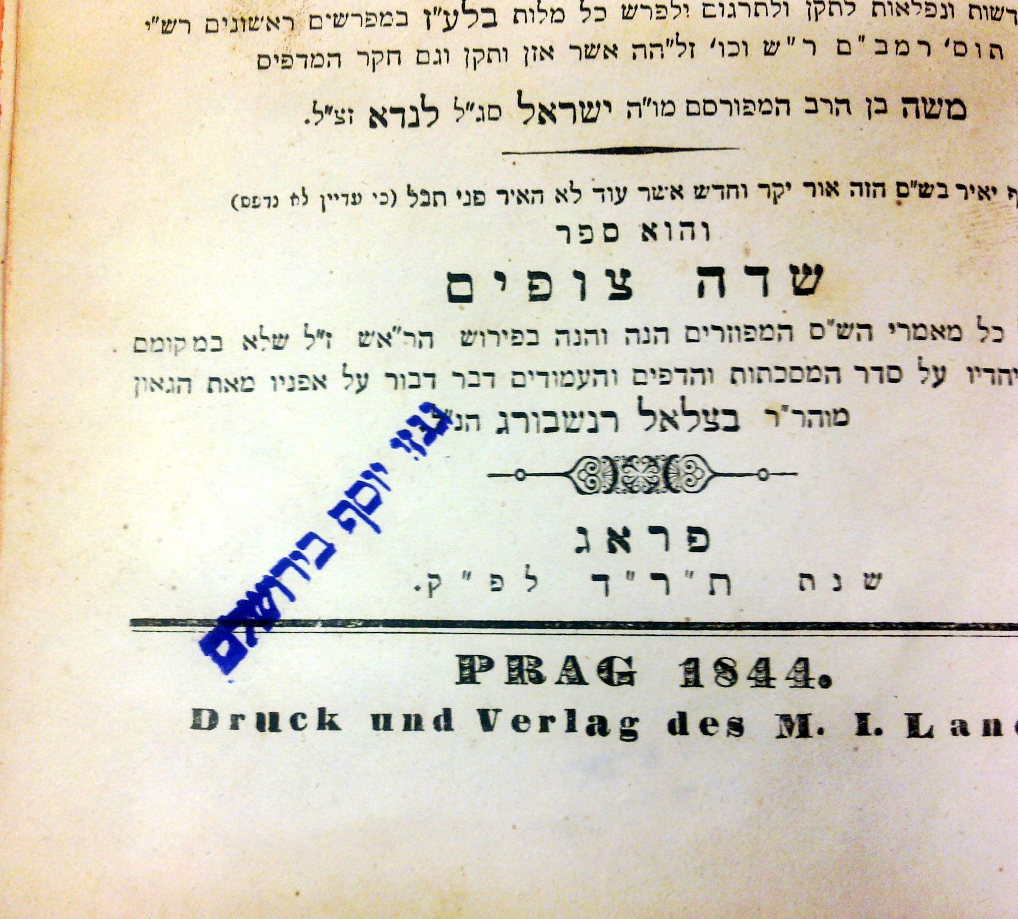 חותמת של חזנוביץ על ספר משנת 1844